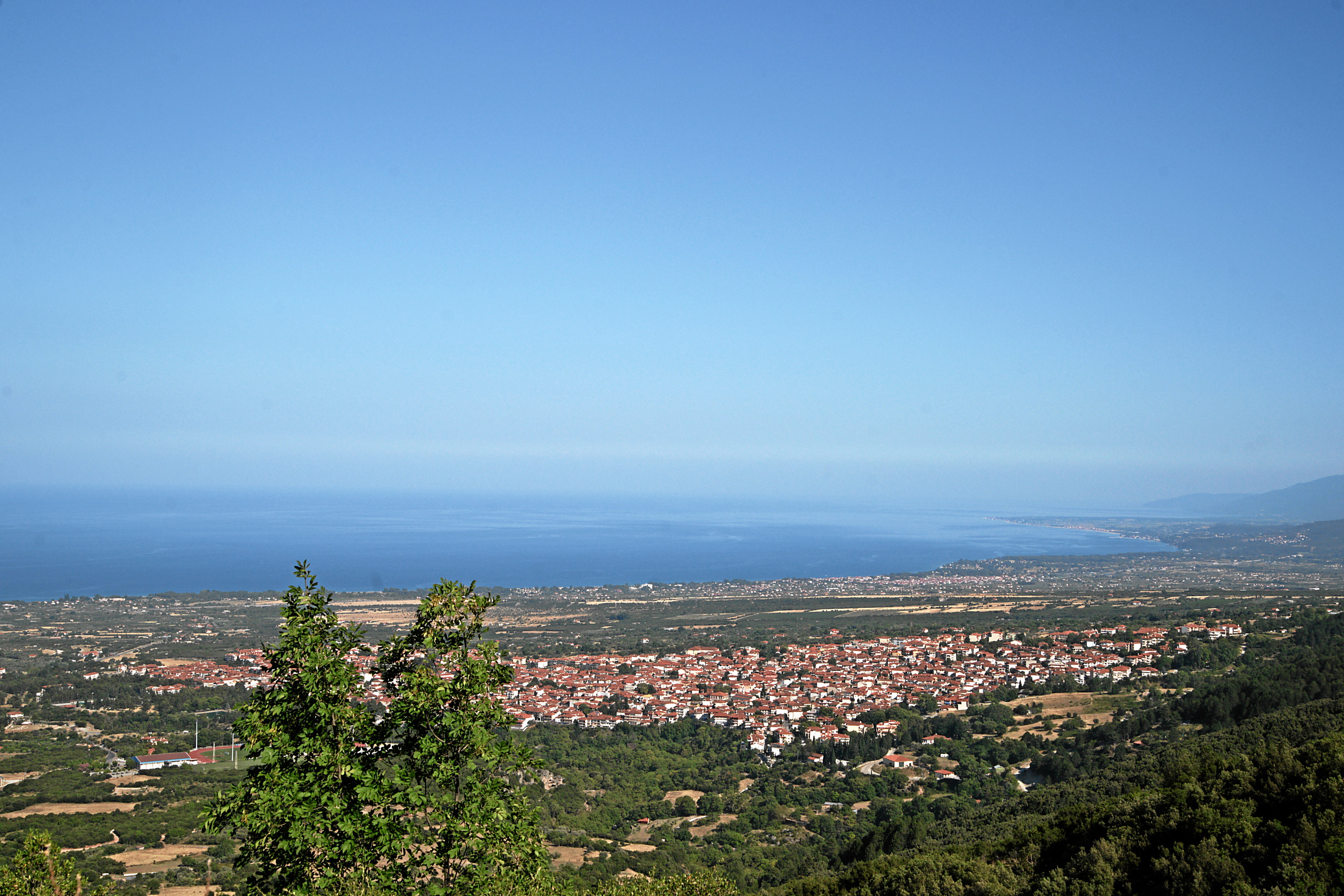 Litochoro: Blick vom Lookout von oben her